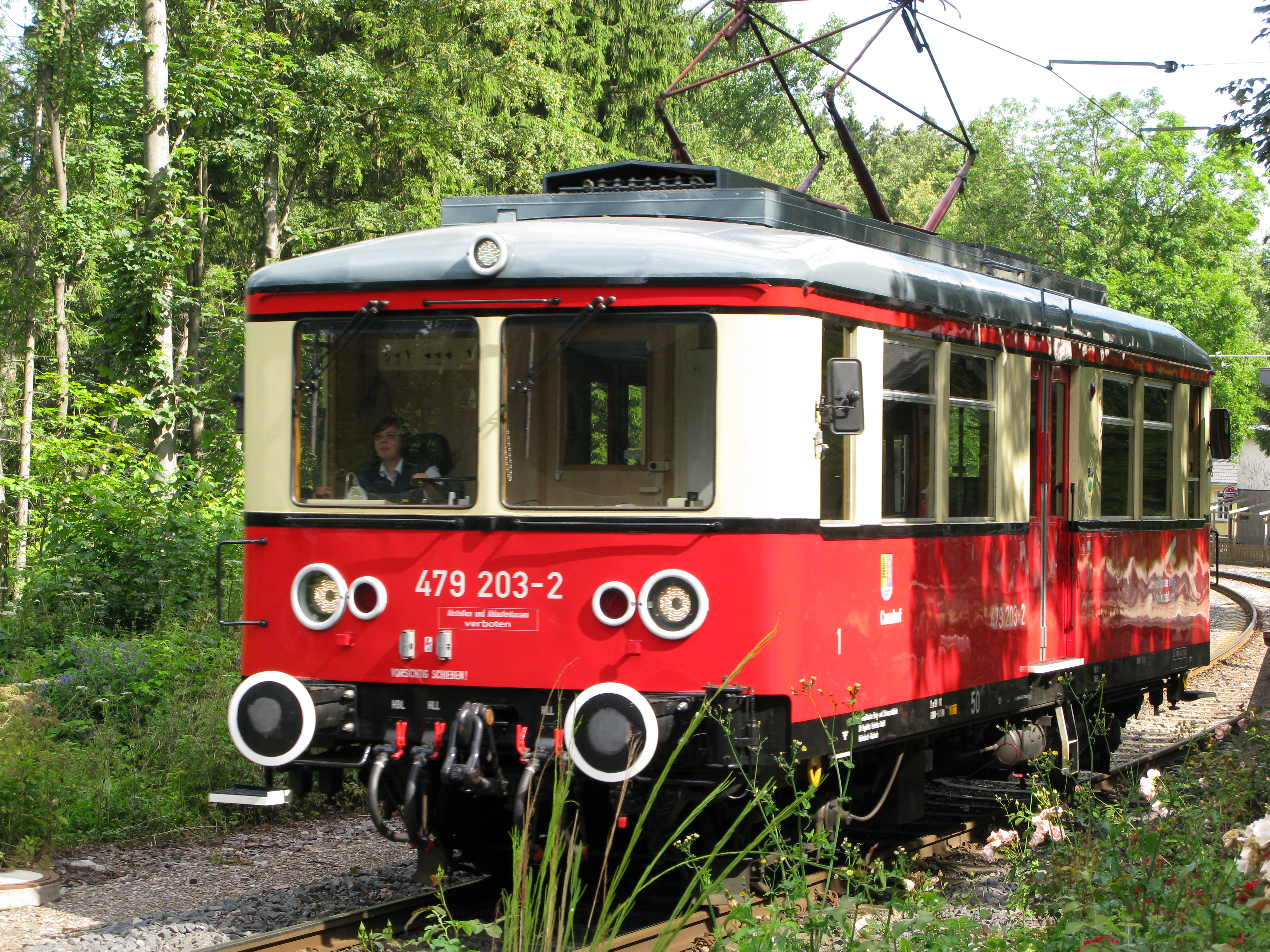 Triebwagen der Oberweißbacher Bergbahn an der Haltepunkt Oberweißbach-Deesbach